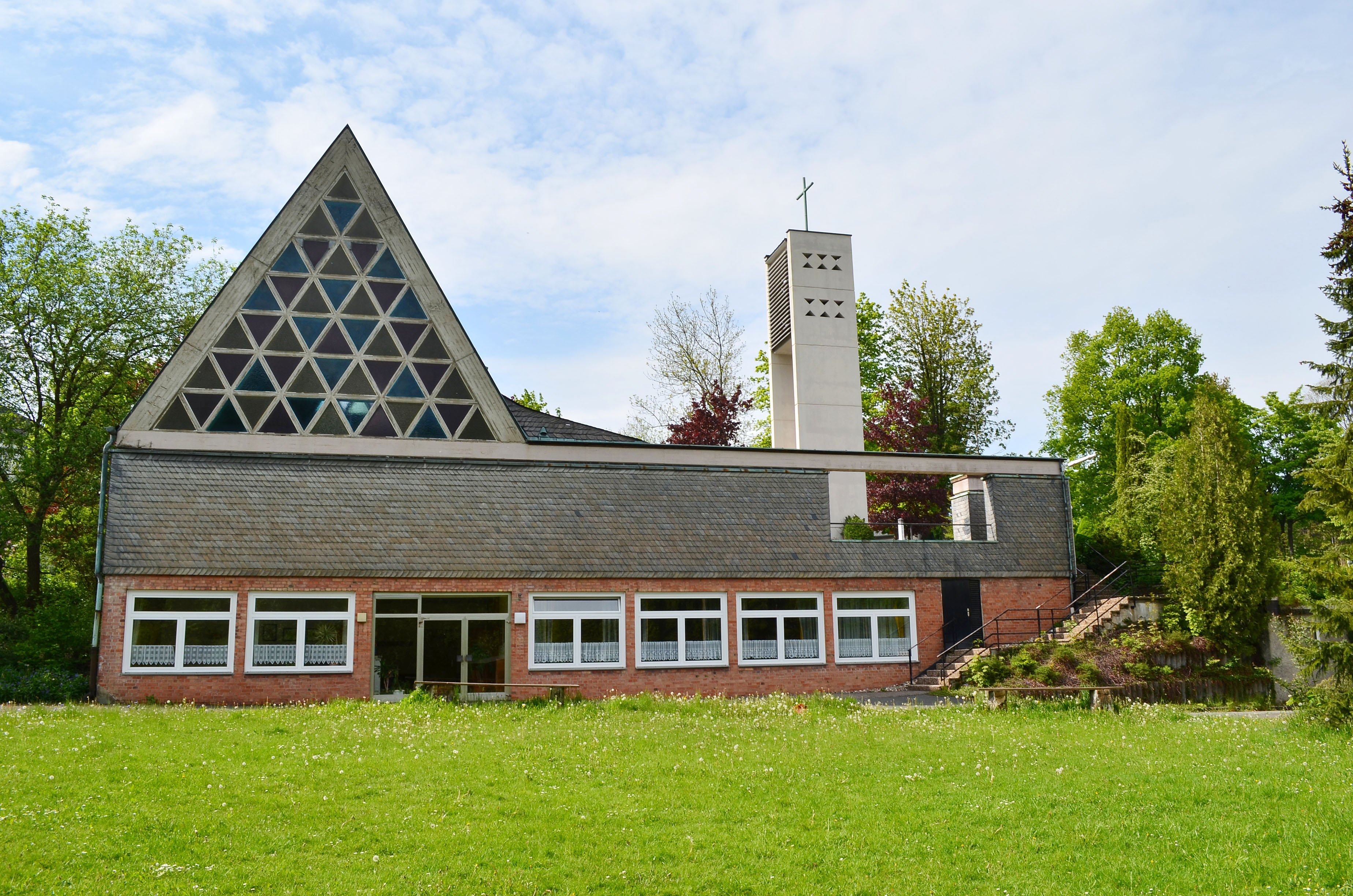 Petersborn\Gudenhagen- Petersborn Ansicht von der Gemeindewiese